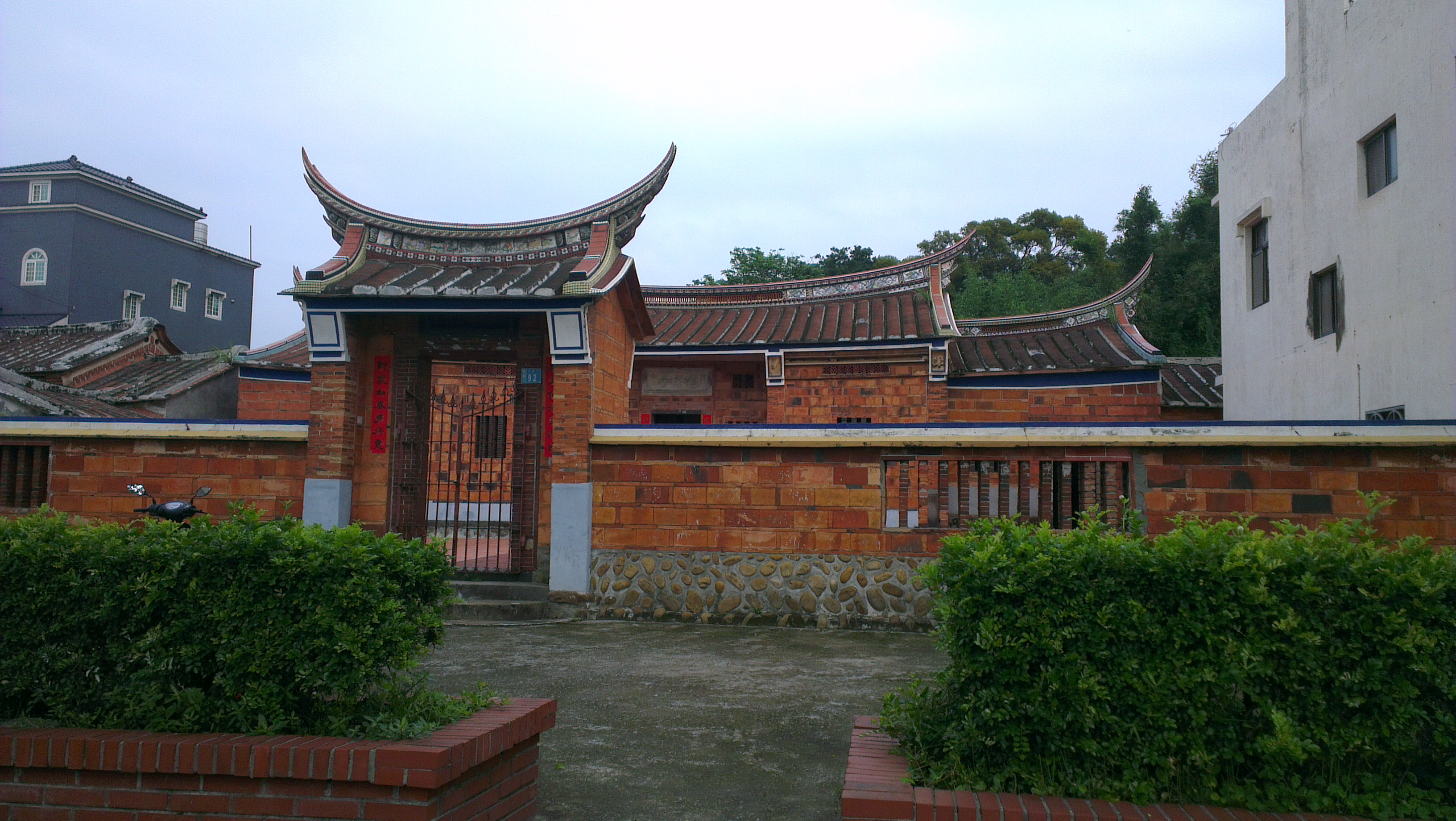 中文（台灣）: 蘆竹德馨堂